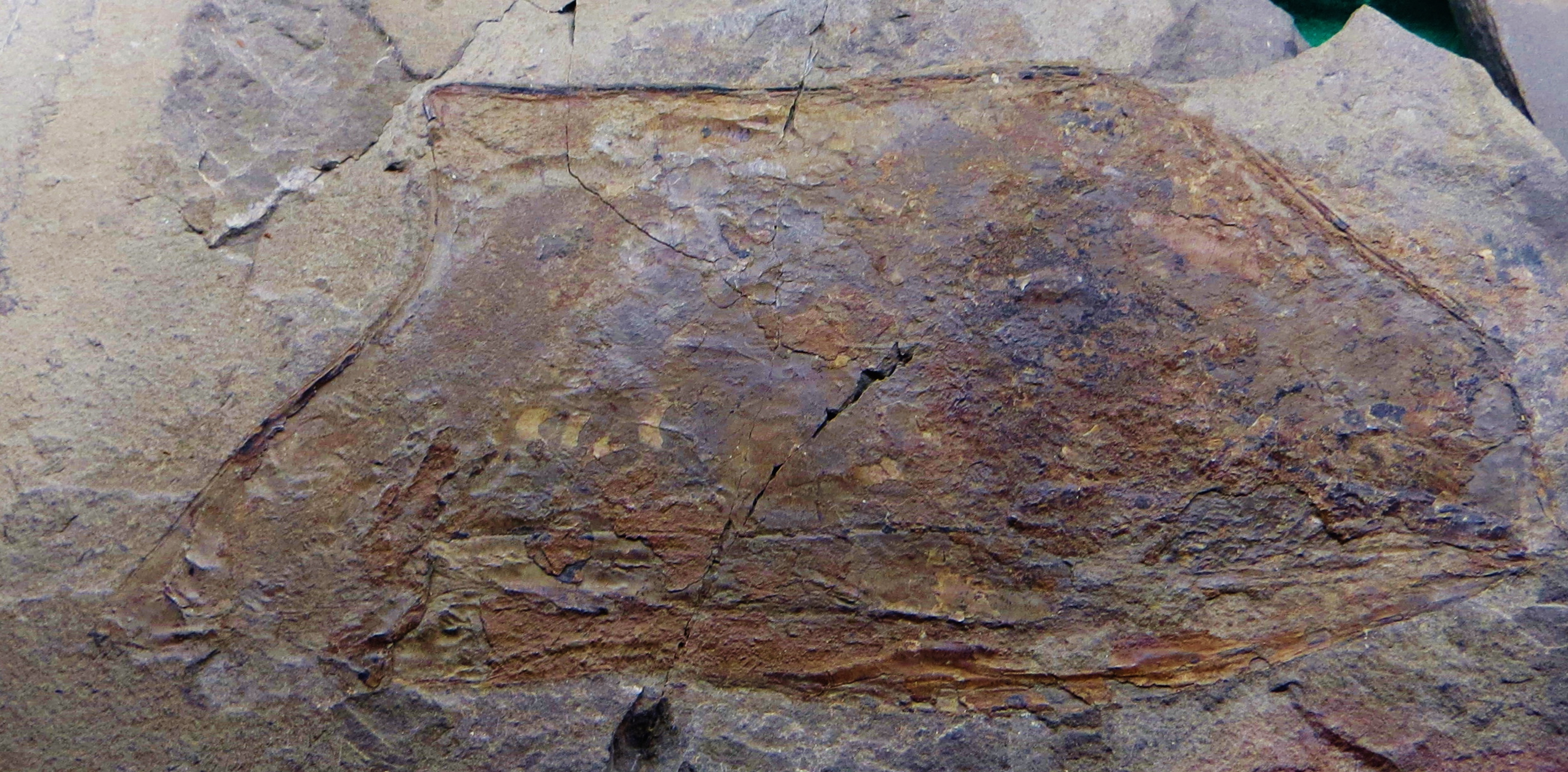 Fossil of Ostenocaris, an extinct crustacean- Took the picture at Museo di Storia naturale “Antonio Stoppani” - Venegono Inferiore